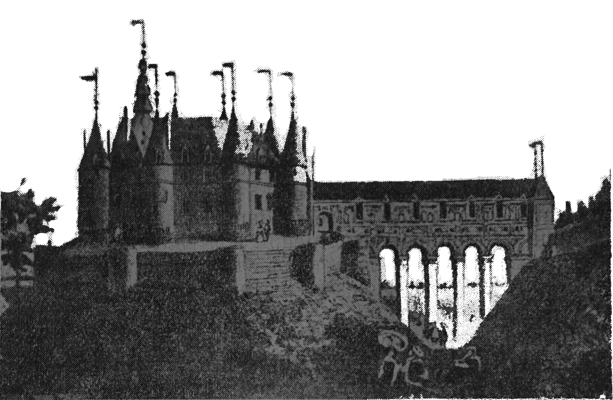 document du début du Template:XXe siècle.